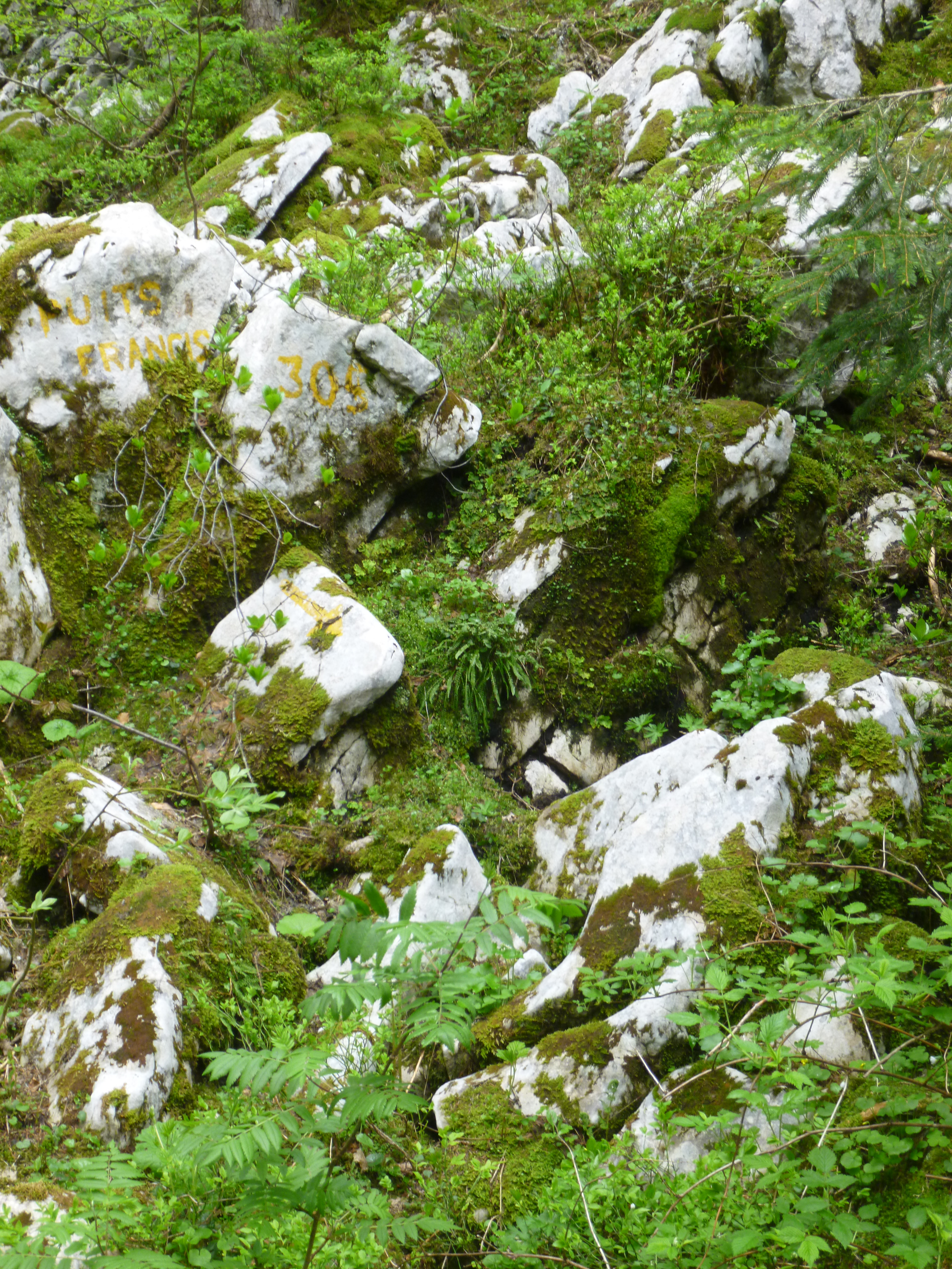 L'entrée historique du réseau.